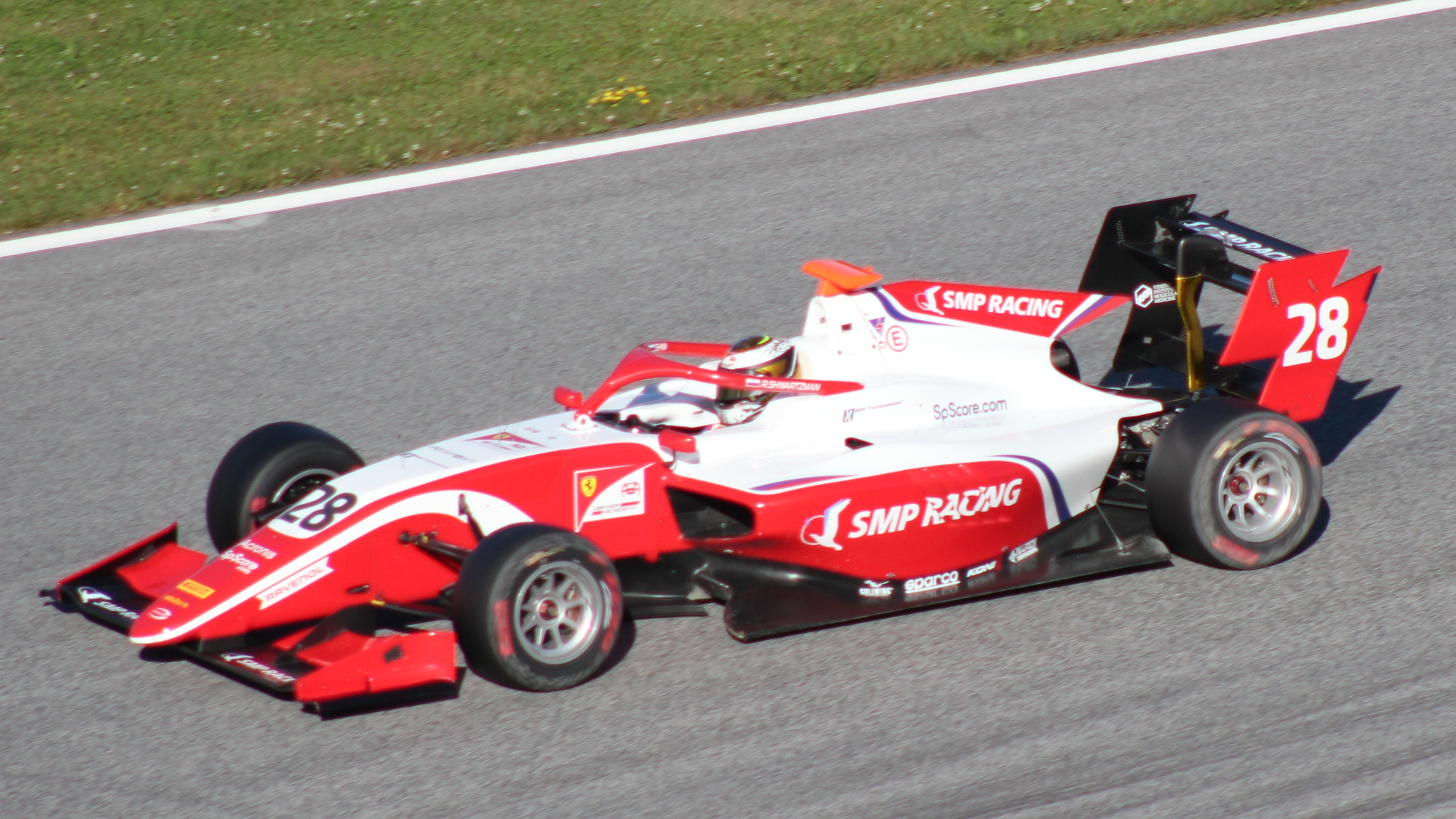 Schwartzman beim Rennwochenende in Österreich 2019